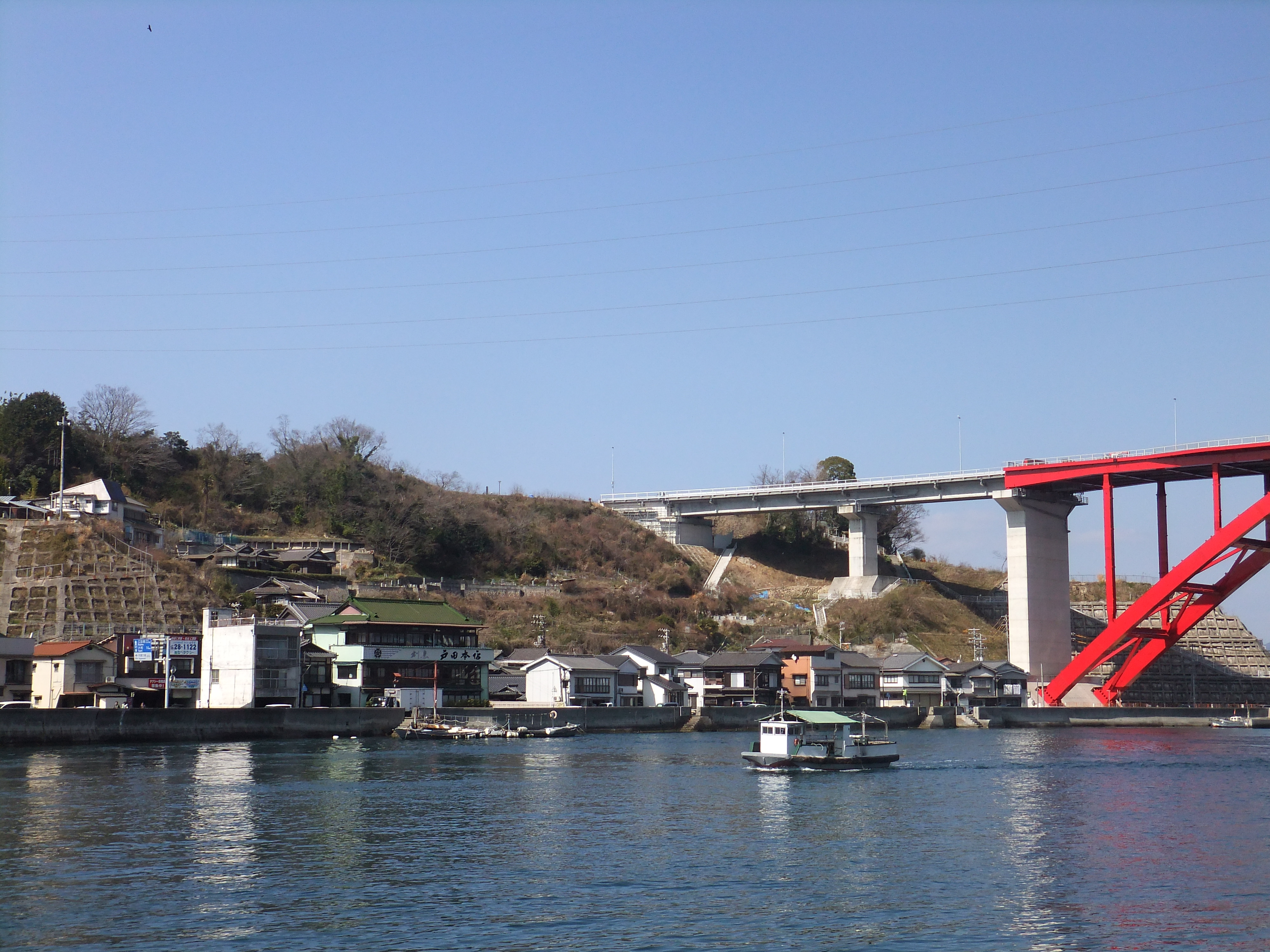 音戸渡船